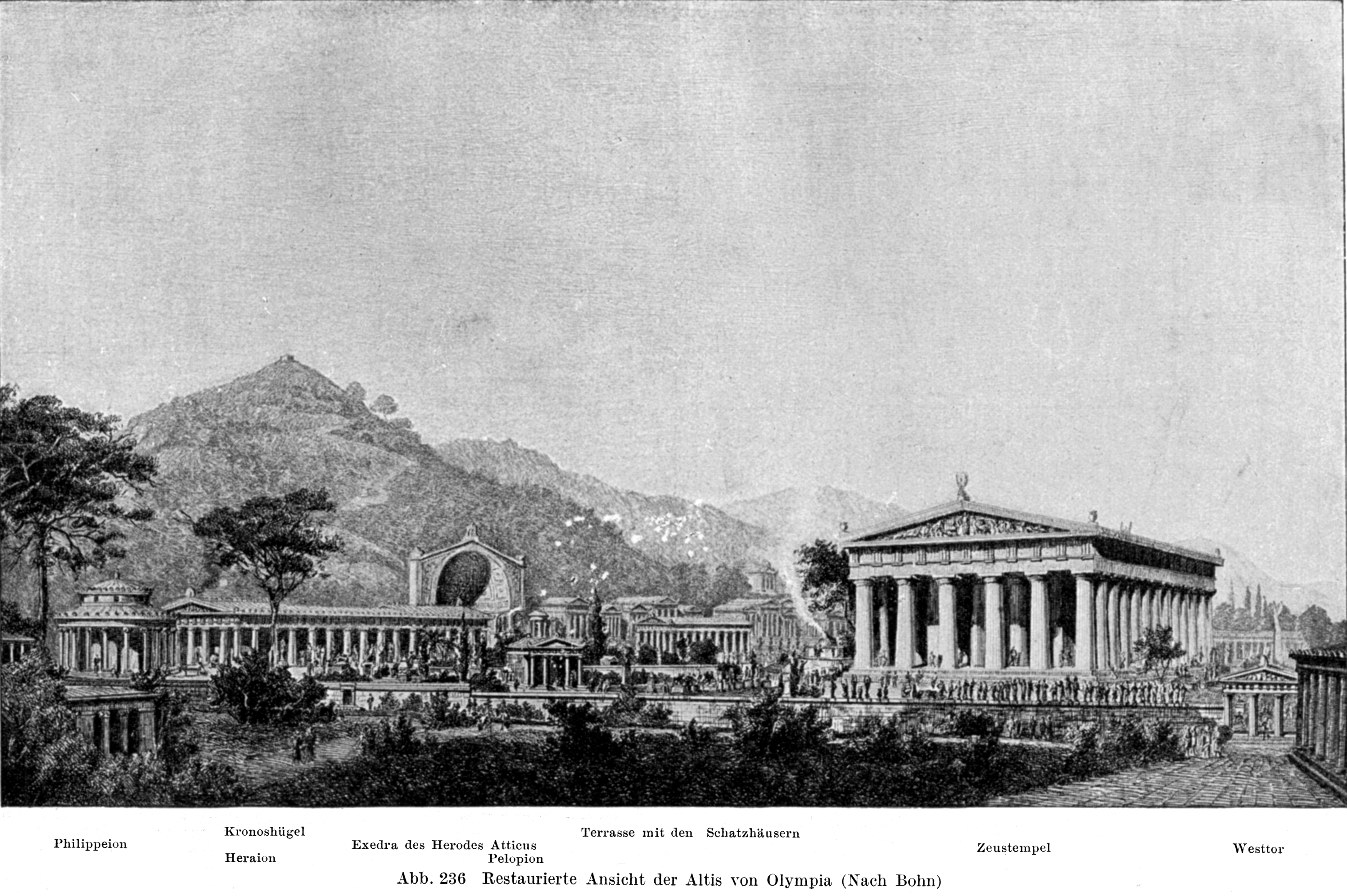 Restaurierte Ansicht der Altis von Olympia. Quelle: Wilhelm Lübke, Max Semrau: Grundriß der Kunstgeschichte. Paul Neff Verlag, Esslingen, 14. Auflage 1908. griechisch